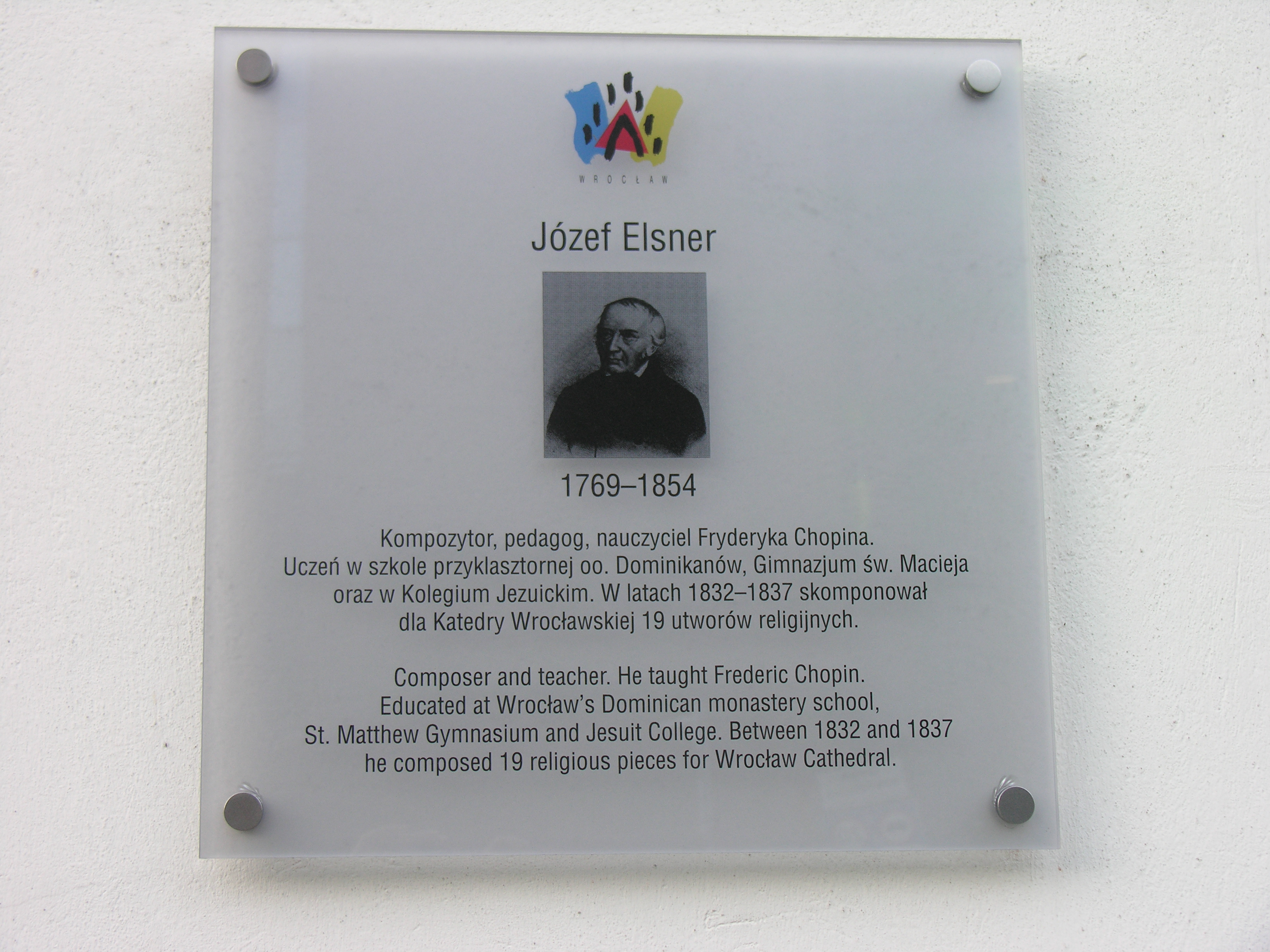 Tablica ku czci Józefa Elsnera we Wrocławiu na dawnym refektarzu dominikanów, Plac Dominikański 2/4